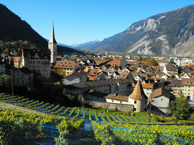 Chur, Switzerland